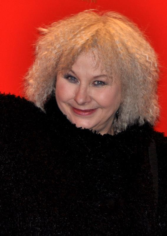 Yolande Moreau à la cérémonie des César